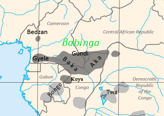 Mapa de asentamientos babinga/Map of distribution of Mbenga Pygmies